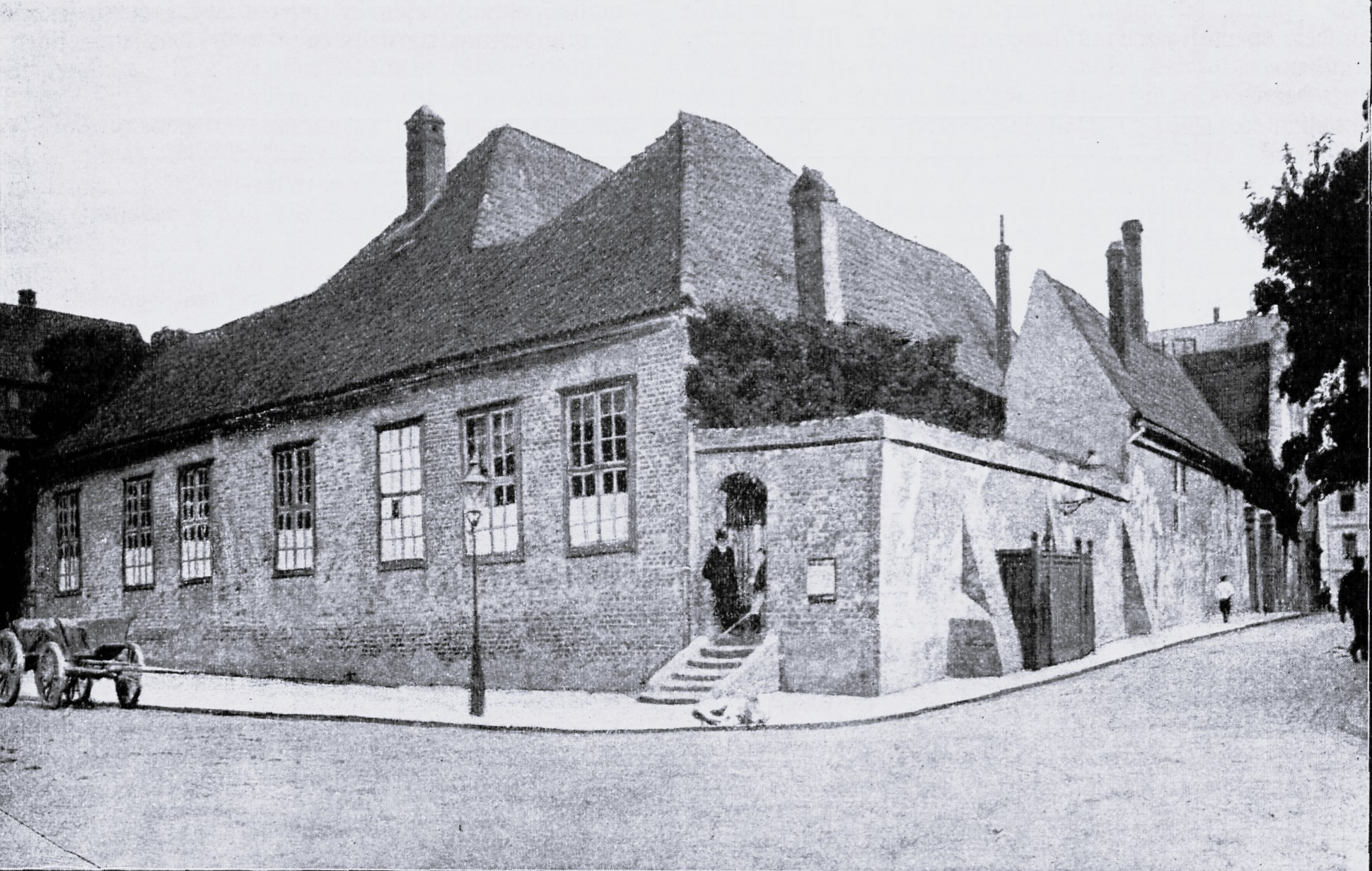 Ehemaliges Unterrichtslokal des Seminars: in der Gewerbeschule im Haus an der Ecke zwischen der Kapitelstraße und dem Pferdemarkt